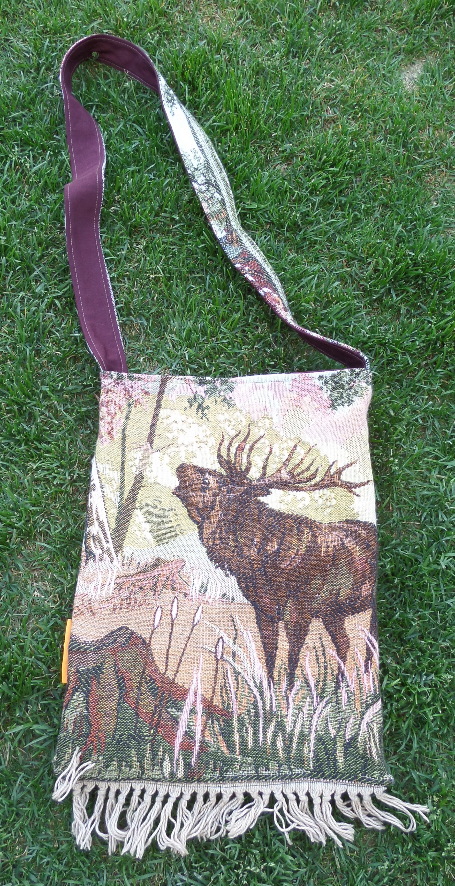 Hirschbeutel, Pennerbeutel